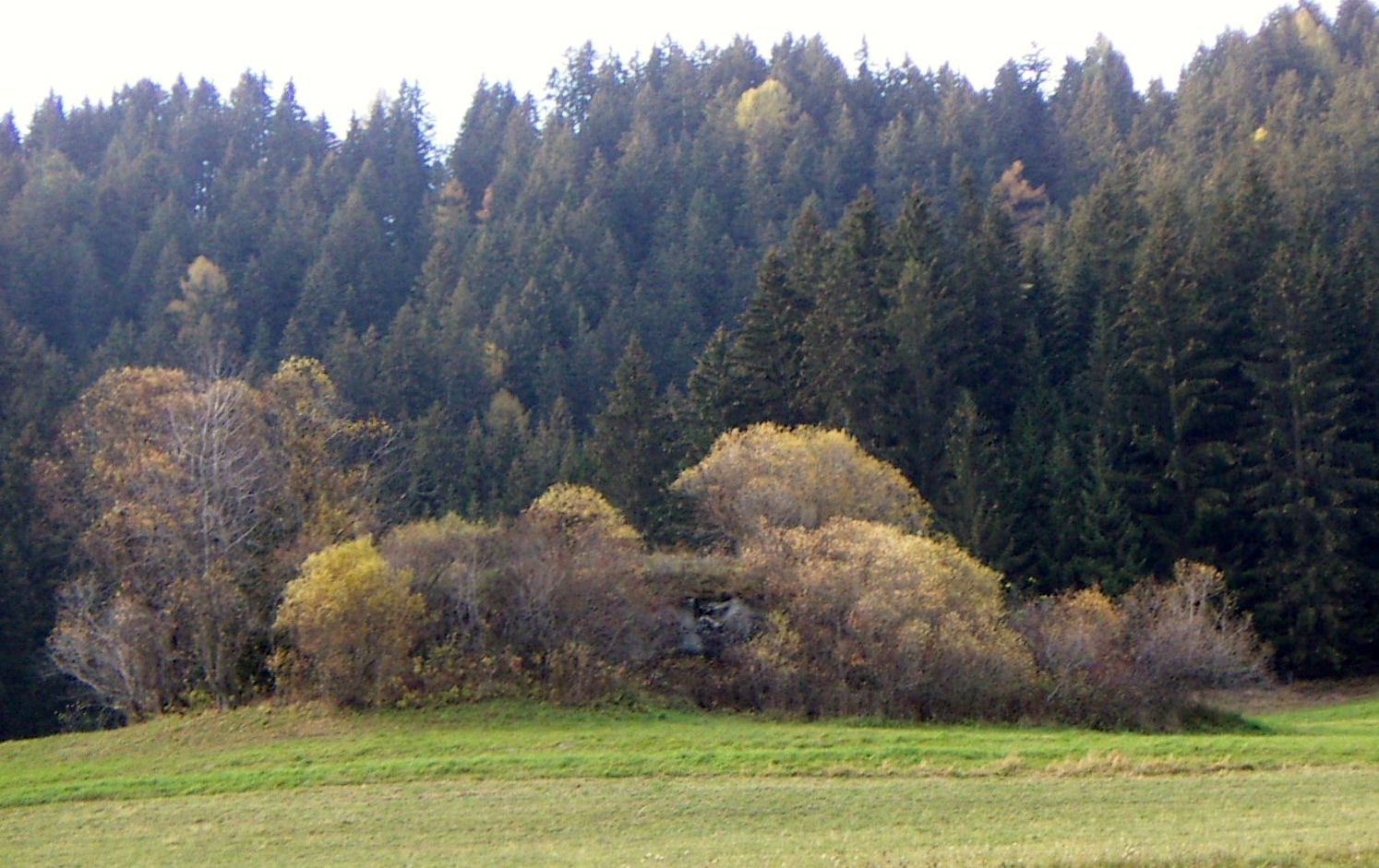 Opera 49, Versciaco, Alto Adige, Italia.